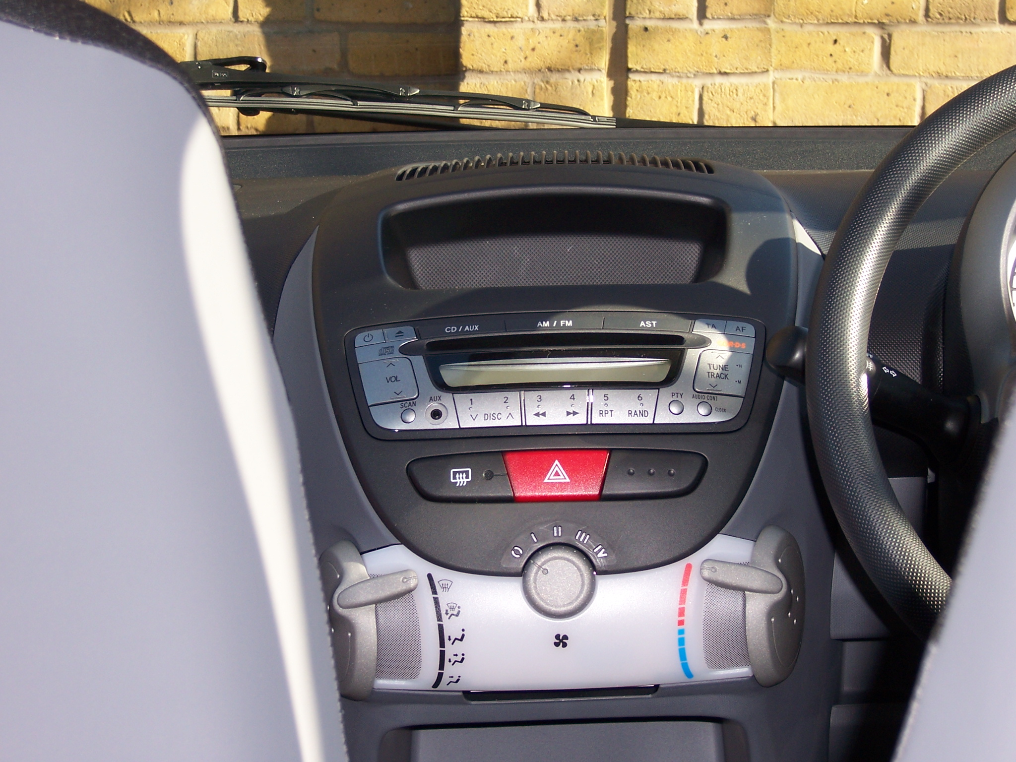 My new car.